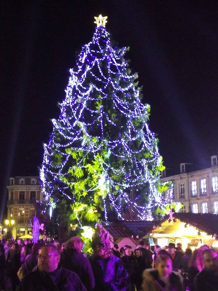 Sapin de Noël de Mons qui a été mis sur la Grand Place de Mons en 2014.